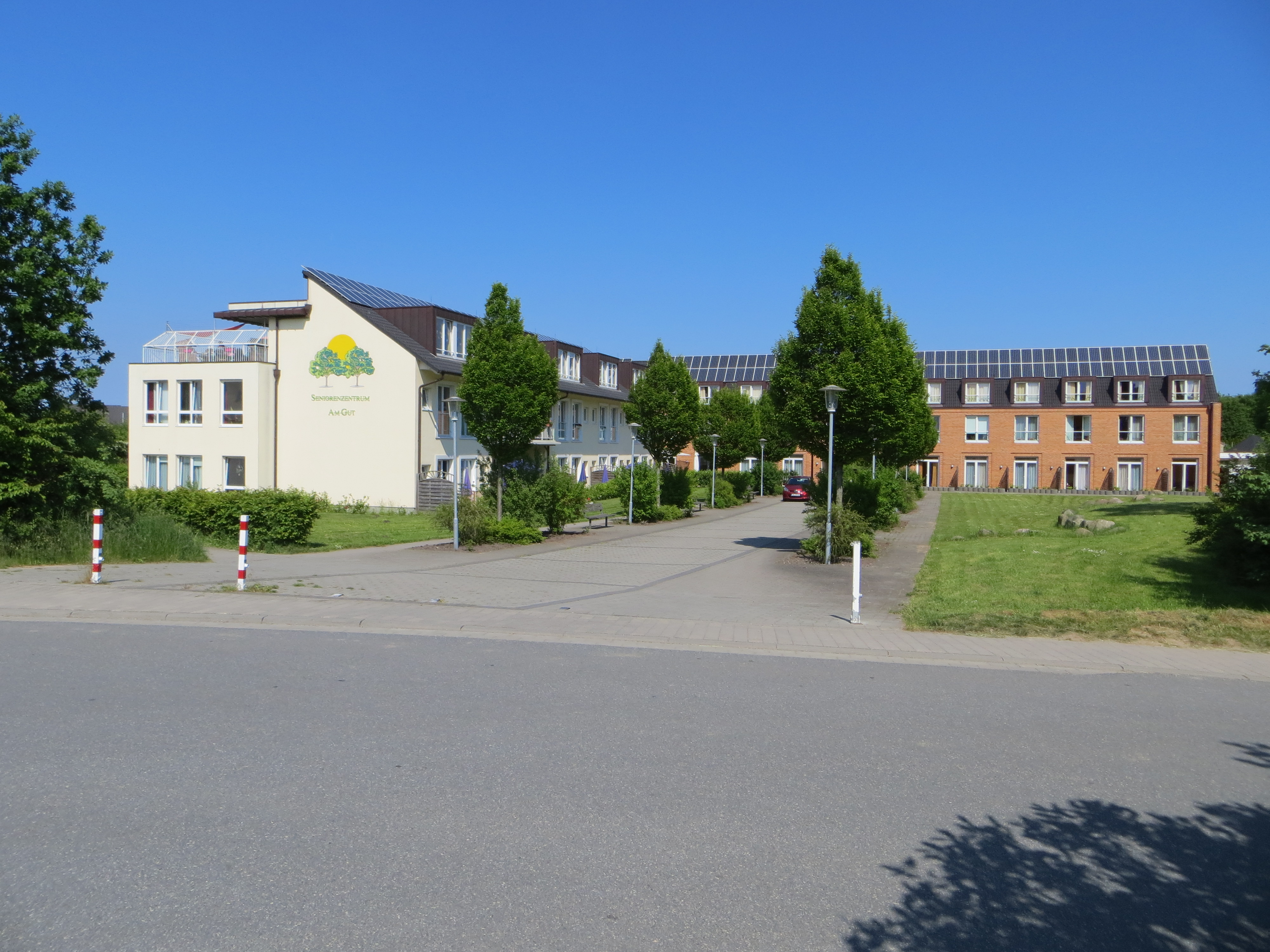 Sünderup, Ortsmitte mit dem Seniorenzentrum am Gut, Sommer 2013